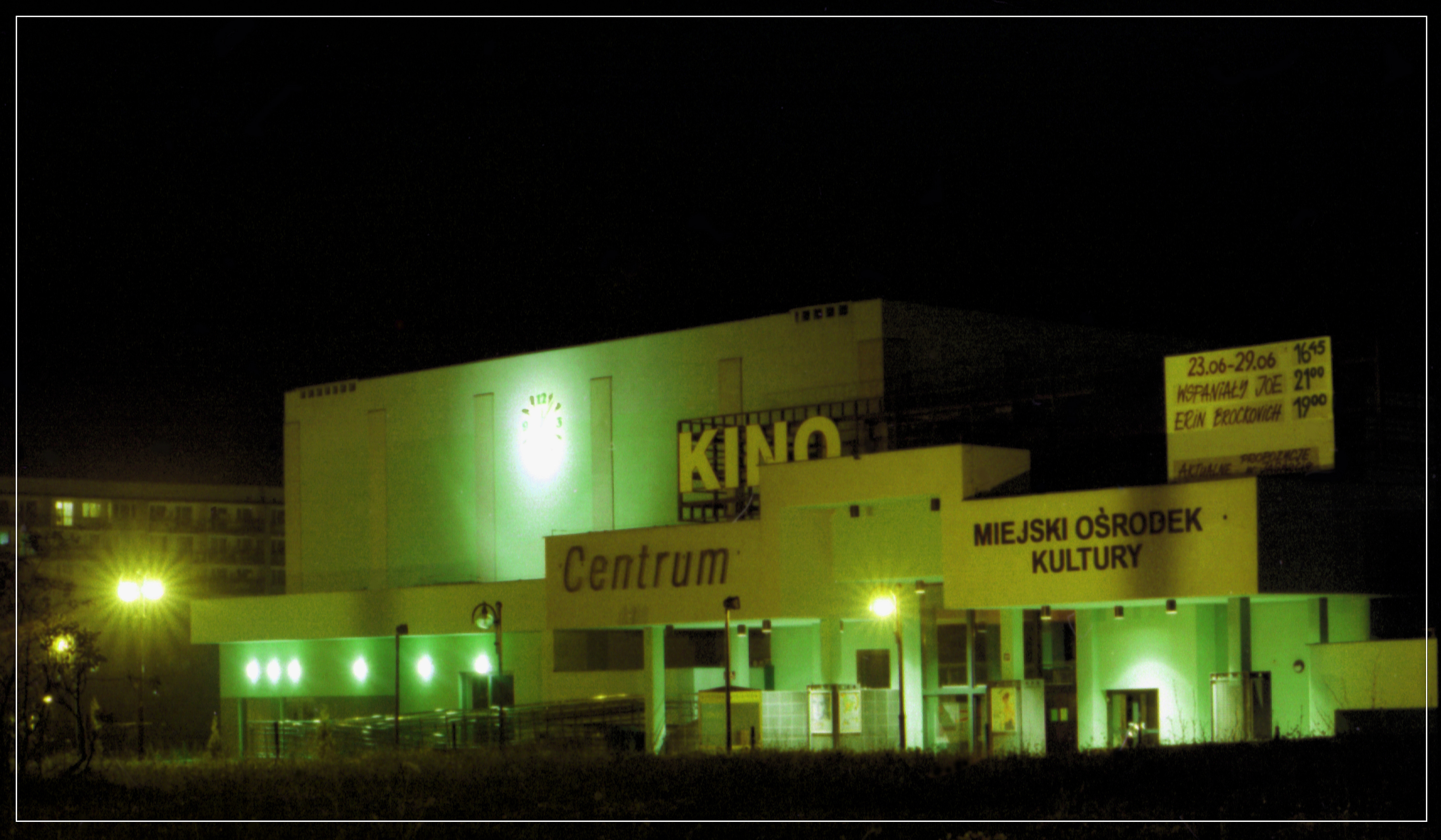 Centrum miasta Jastrzębie Zdrój